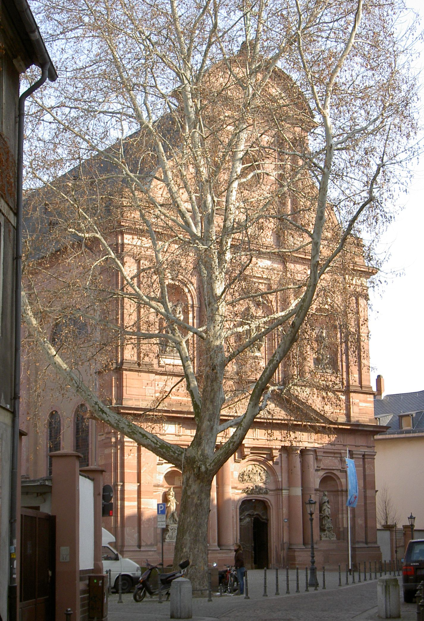 Kapuzinerstraße 40: Katholische Pfarrkirche St. Ignaz, Fassade in der Denkmalzone Kapuzinerstraße. Kreuzförmiger barocker Saalbau mit dreigeschossiger Schaufassade nach vorbarockem französischem Vorbild, 1763–75, Architekt Johann Peter Jäger, Skulpturenschmuck von Johann Jakob Junker (1772) und Nikolaus Binterim (1752)